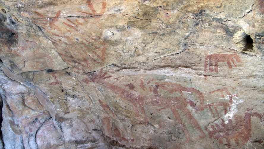 Algunas pinturas seminaturalistas y esquemáticas